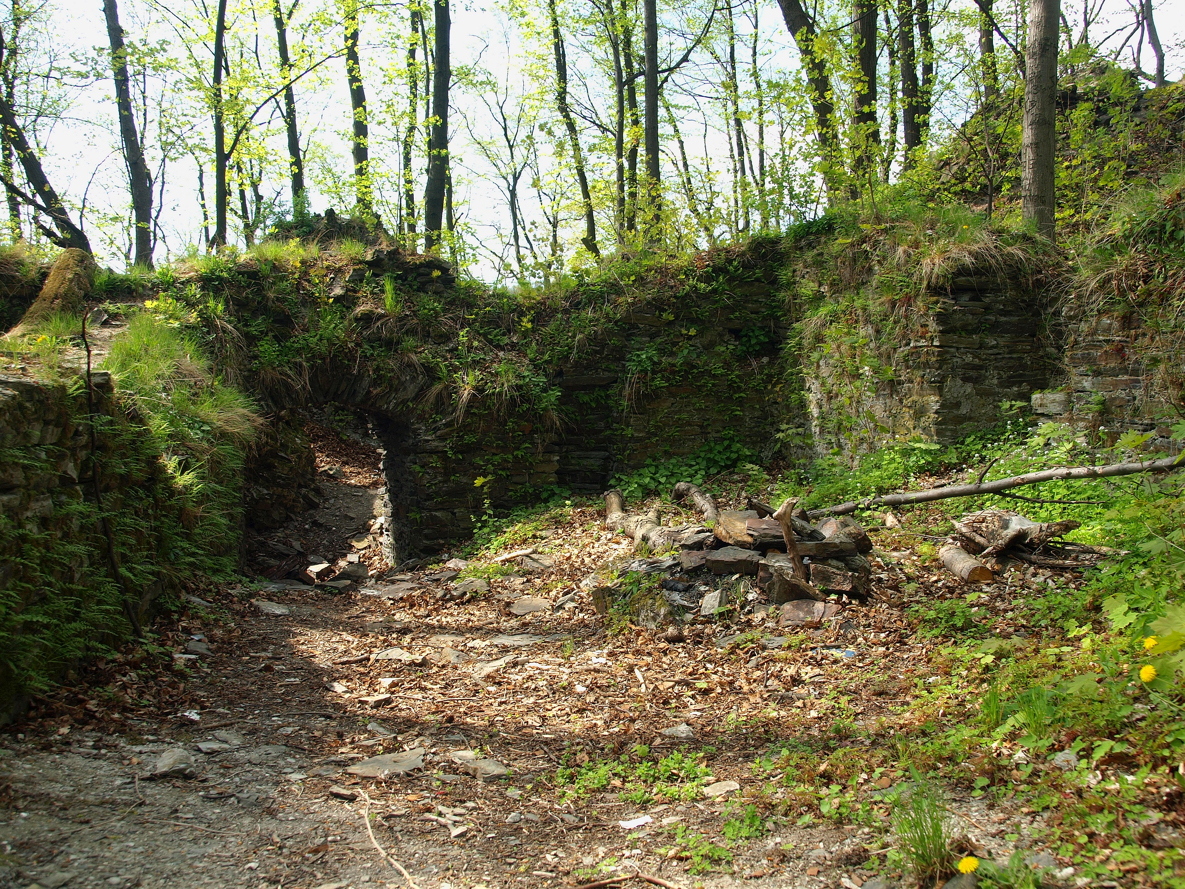 Hrad Drahotuš, zřícenina, cca 400 m severně od kostela v Podhoří, Slavkov